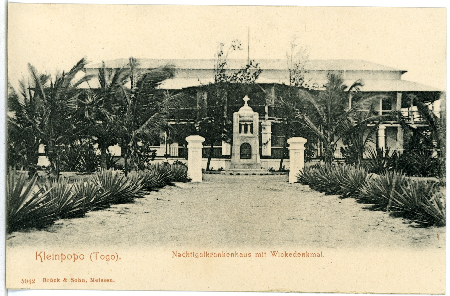 Kleinpopo; Nachtigallkrankenhaus mit Wickedenkmal This postcard is from publisher Brück & Sohn in Meißen ( postcard has a unique number 05042 and is available in a higher resolution at the publisher. This images was uploaded in a cooperation project between Wikipedians and the publisher.